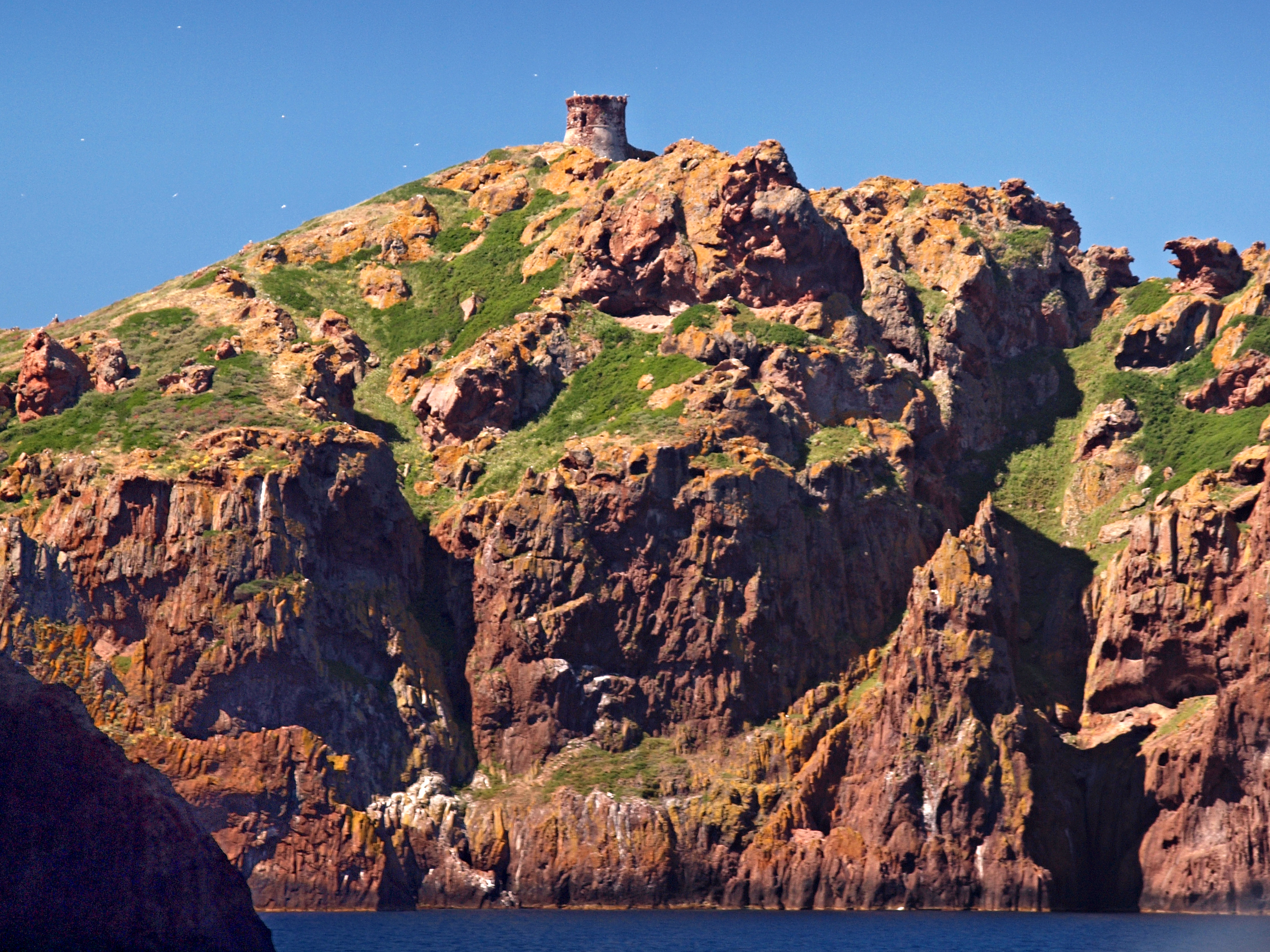 Osani, Ouest Corse (Corse) - Tour de Gargali (Gargalu) sur l'île éponyme, (Isola di Gargalu), extrémité occidentale de la Corse